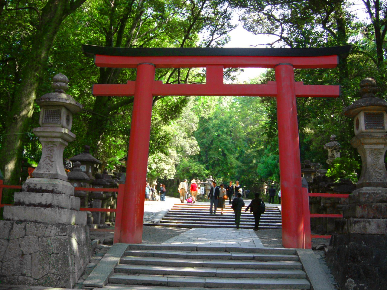 Foto modificada para obtener un aspecto de cómic. La vista aparece en el cómic La banda del dragón despeinado, de Superlópez, concretamente en la primera viñeta de la página nº 2 de la historieta BANZAI! (la bomba)